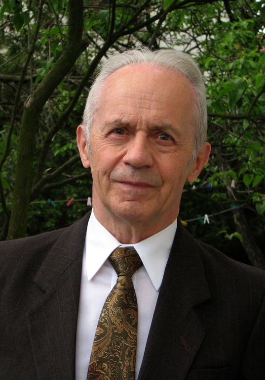 Jan Karol Żytka